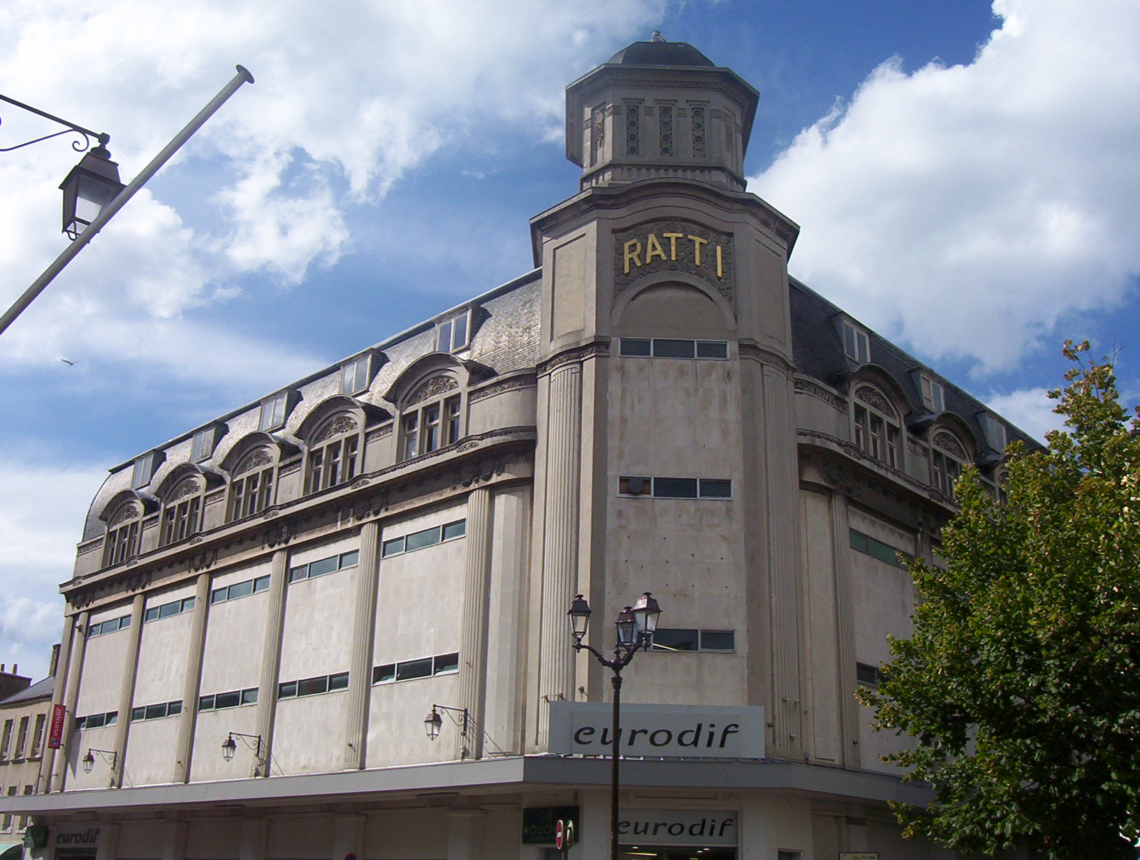 Ancien magasin Ratti, suivi par l'enseigne Magasins réunis à Cherbourg-Octeville.